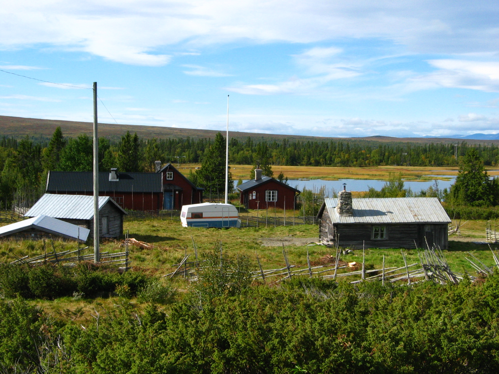 Västra Arådalens turiststation, Oviksfjällen Fotograf: Användare:Toggan